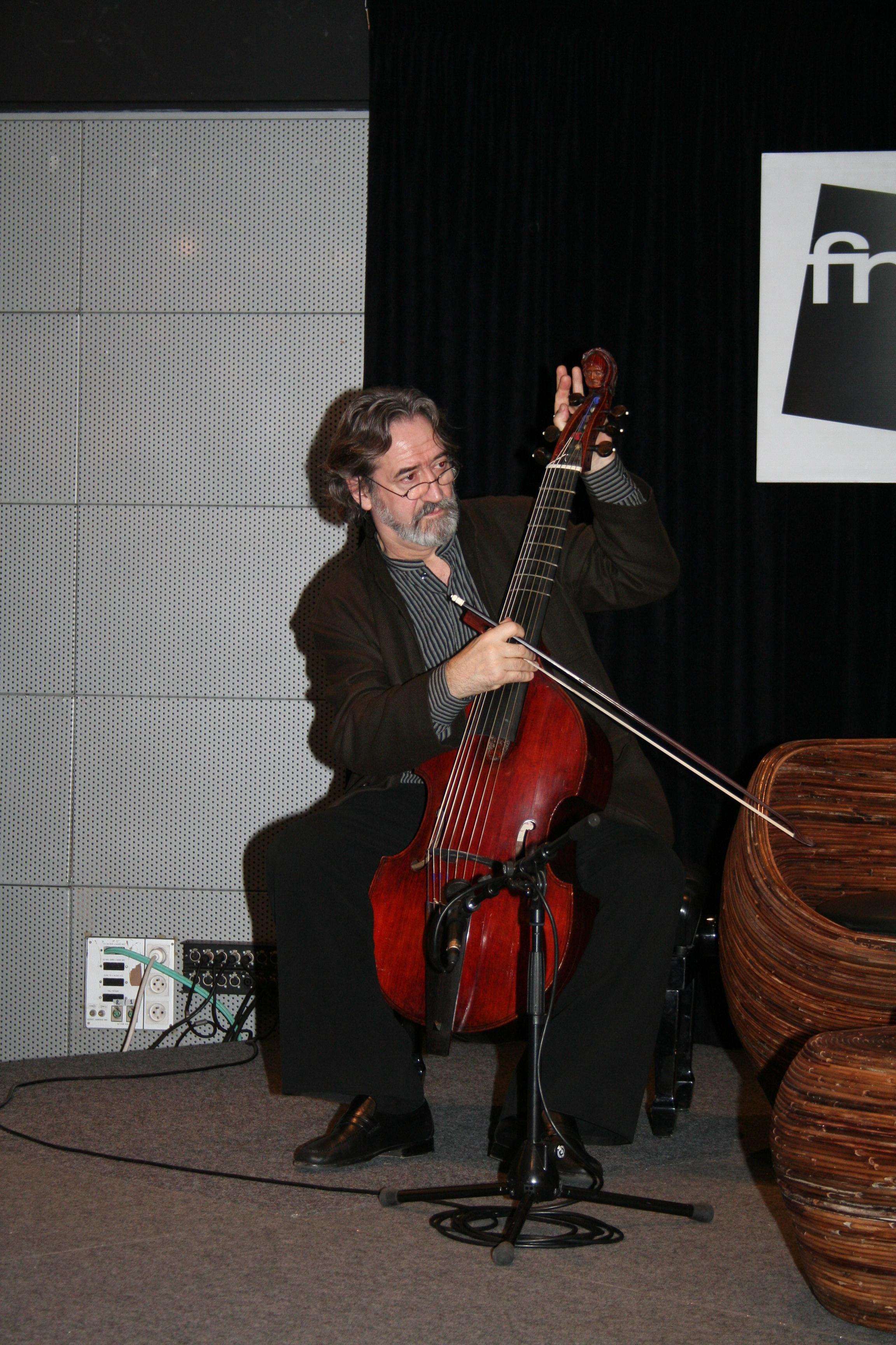 Rencontre avec Jordi Savall organisée par la Fnac des Ternes (Paris, France) pour la sortie de l'album Paradis perdus Christophorus Colombus.